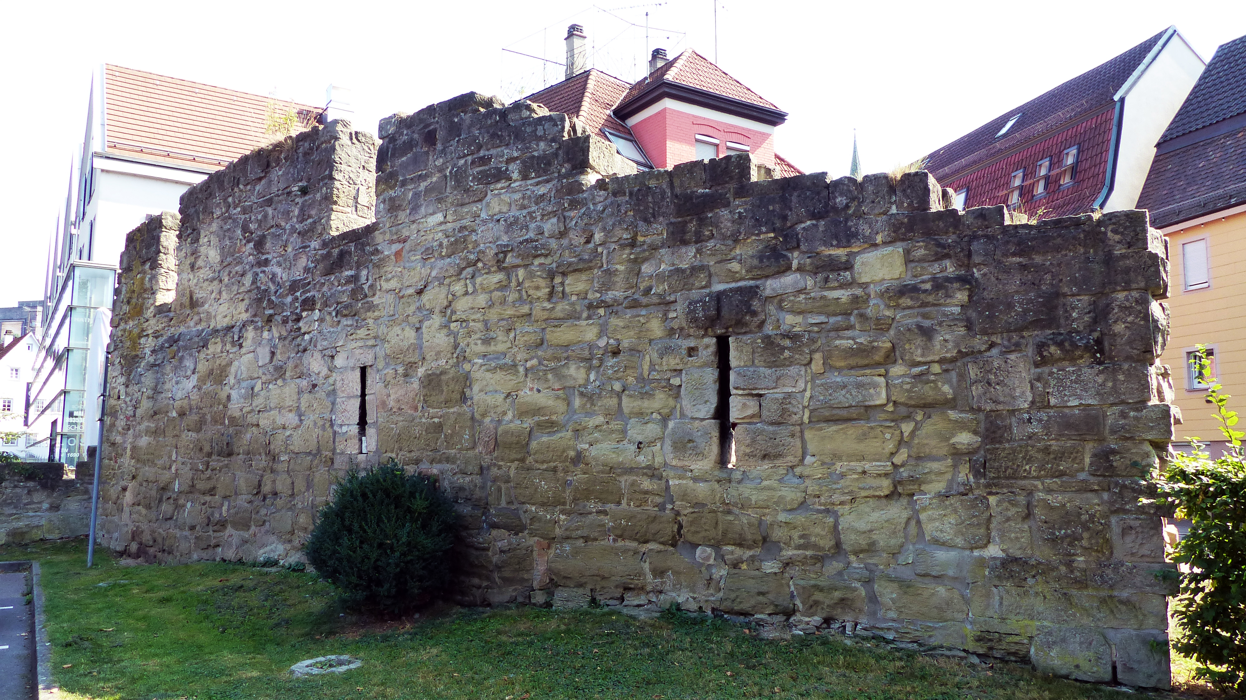 Stadtmauerrest in Schorndorf, An der Mauer